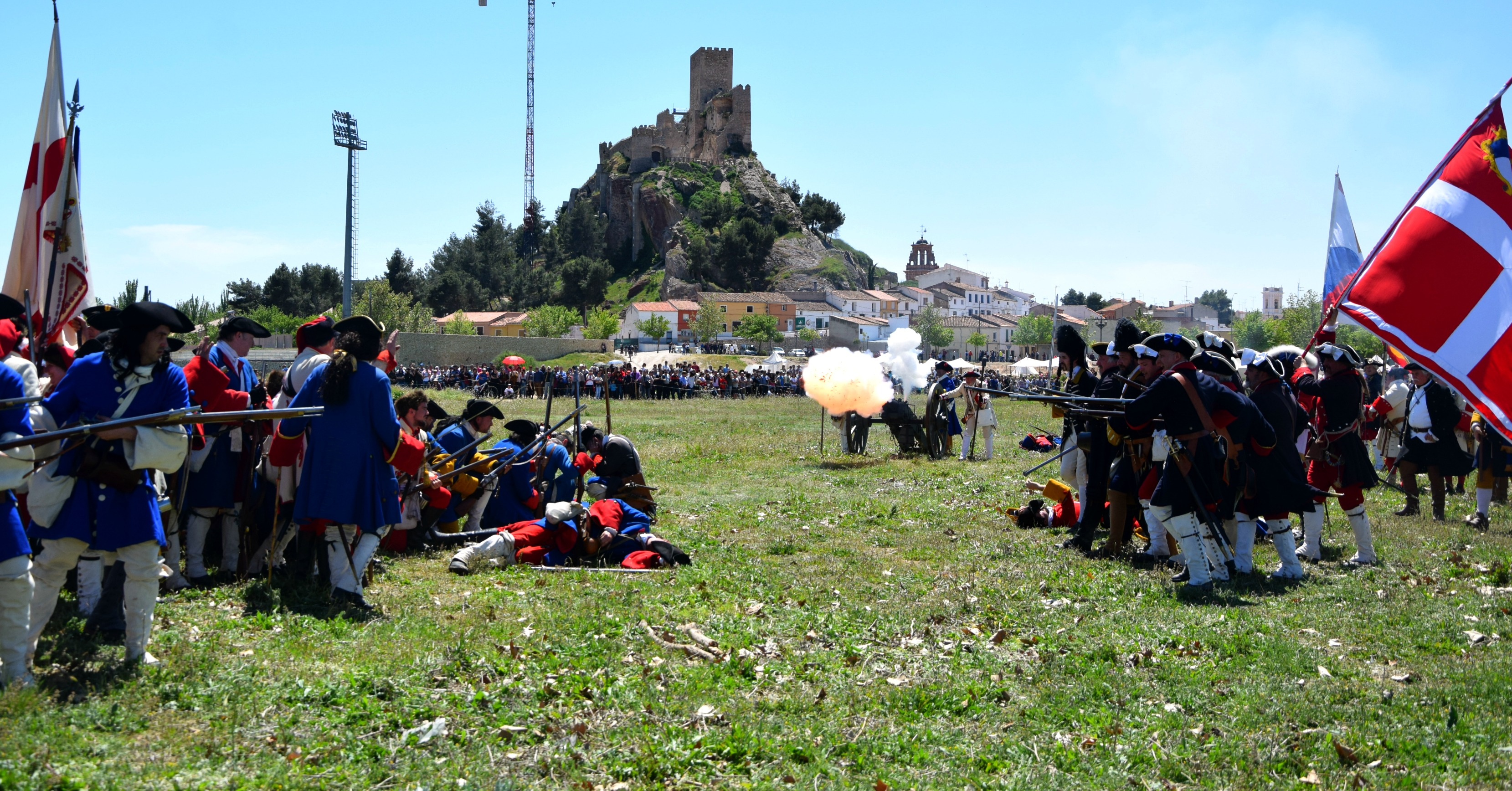 Recreació de la batalla d'Almansa. Abril de 2017.